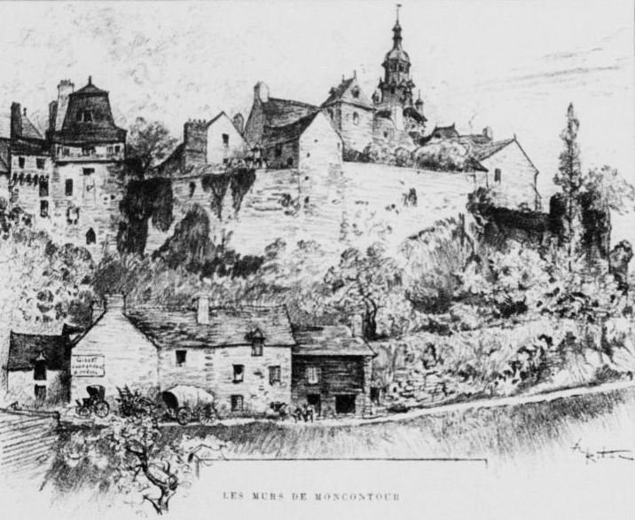 Moncontour vers 1900 (lithographie d'Albert Robida publiée dans "La vieille France, Bretagne" vers 1900)